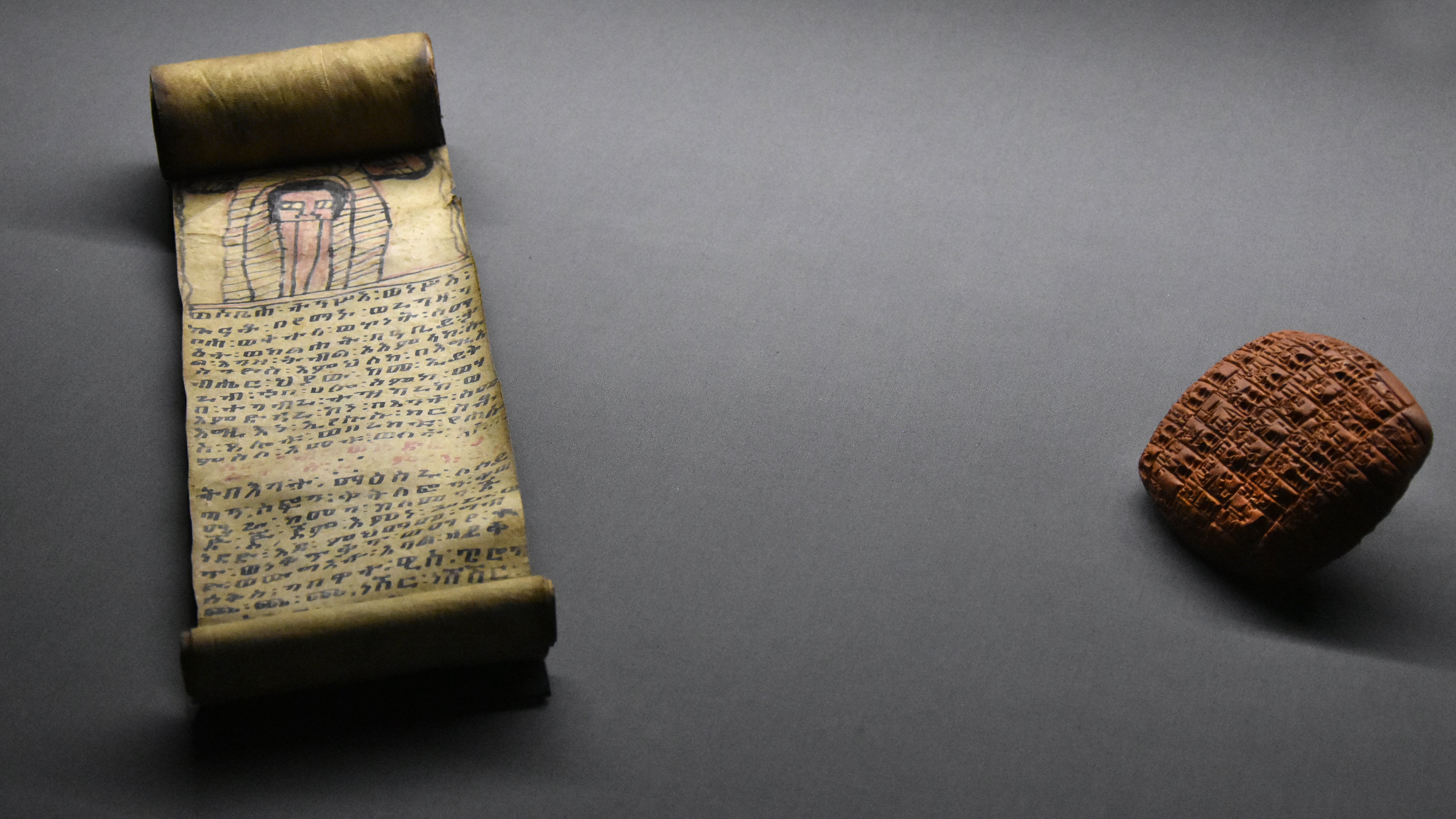 Ethiopische magische rol (19e eeuw) links - kleitablet uit Mesopotamië met spijkerschrift This is a file created at the museum: Royal Library of Belgium in Brussels